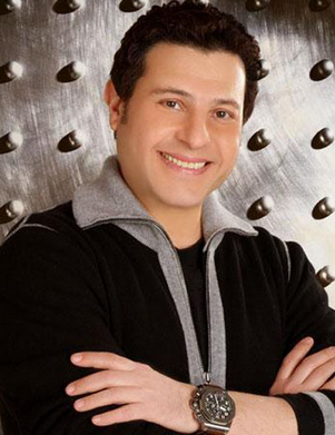 هانى